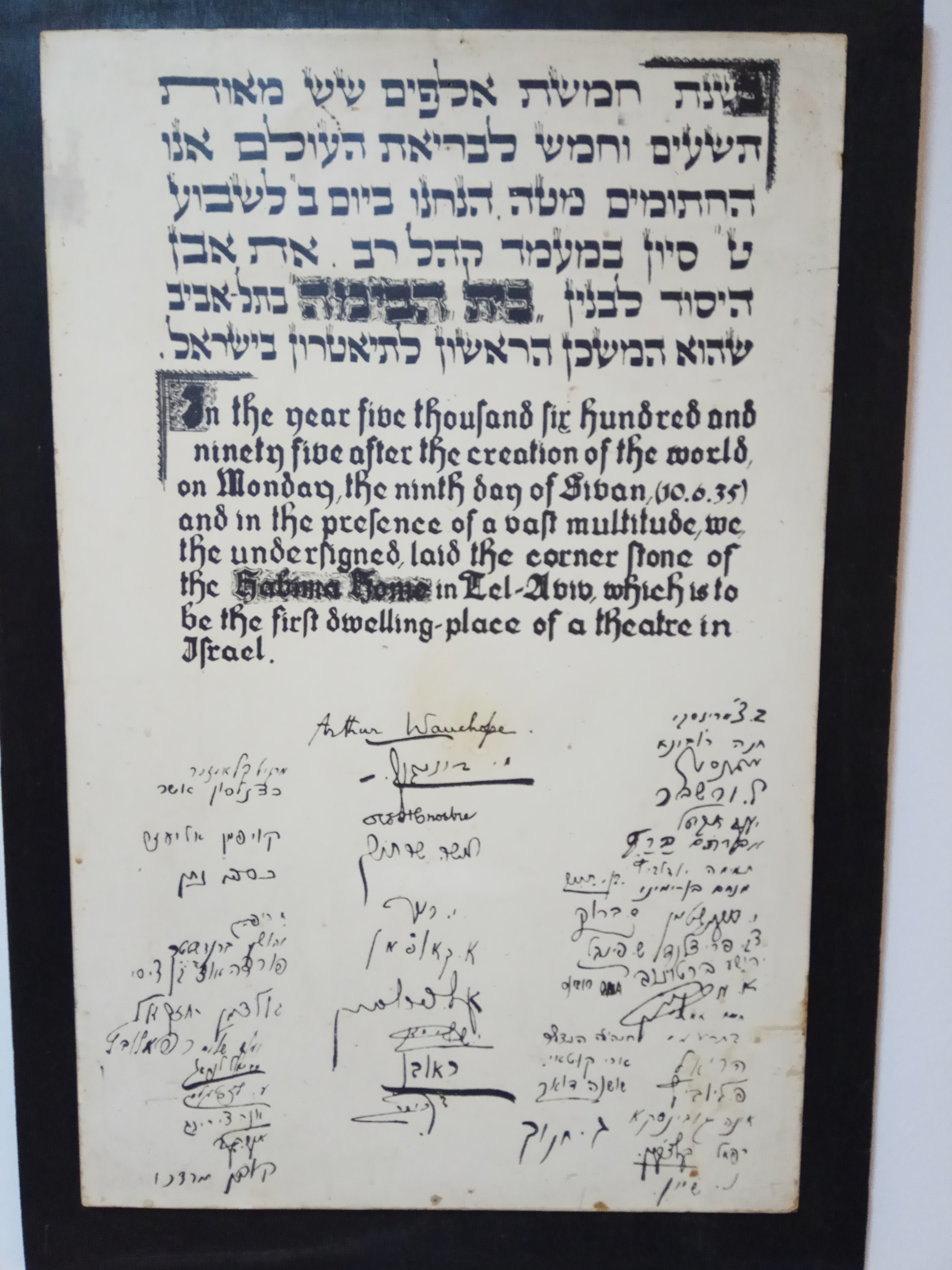 מגילת היסוד של התיאטרון הלאומי הבימה